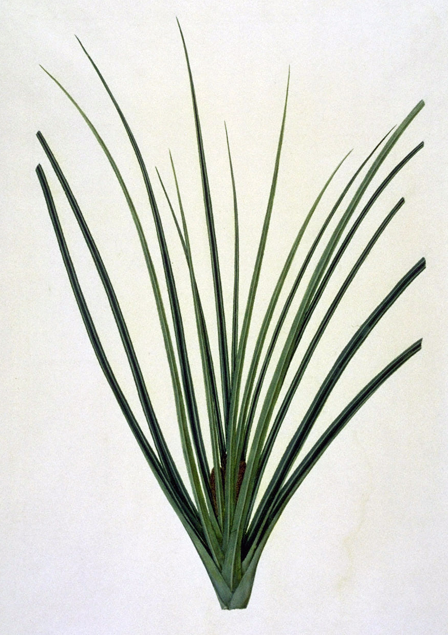 Kiekie, (Freycinetia banksii), New Zealand. Syn: Freycinetia baueriana subsp. banksii.